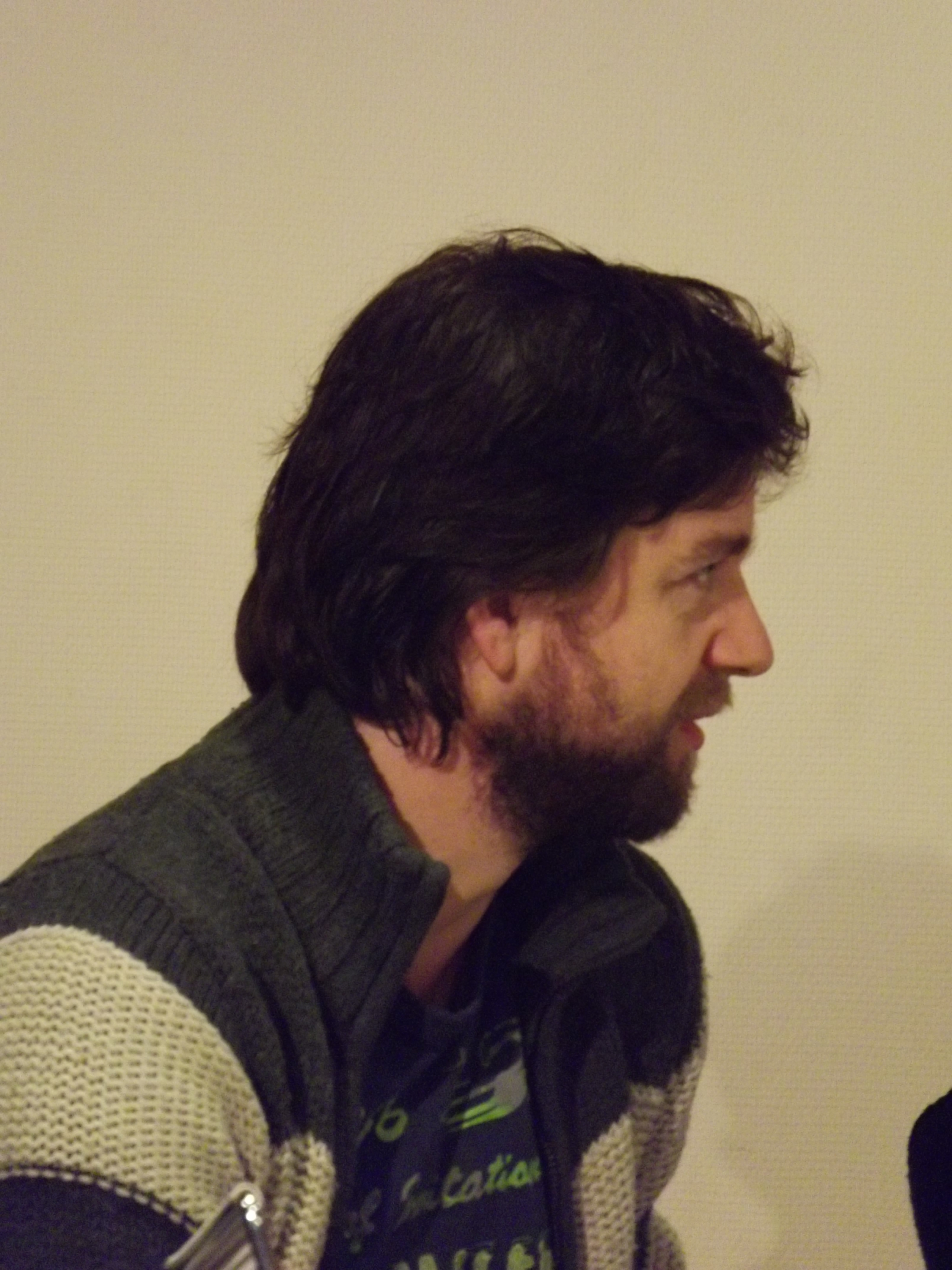 Foto van de Vlaamse acteur Koen De Graeve (°1972) tijdens de opnames van het radioprogramma En Nu Serieus op 21 januari 2012